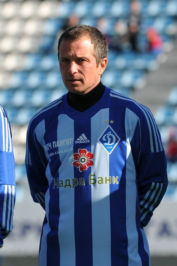 Артем Яшкін на Матчі пам'яті Белькевича, Баля і Гусіна